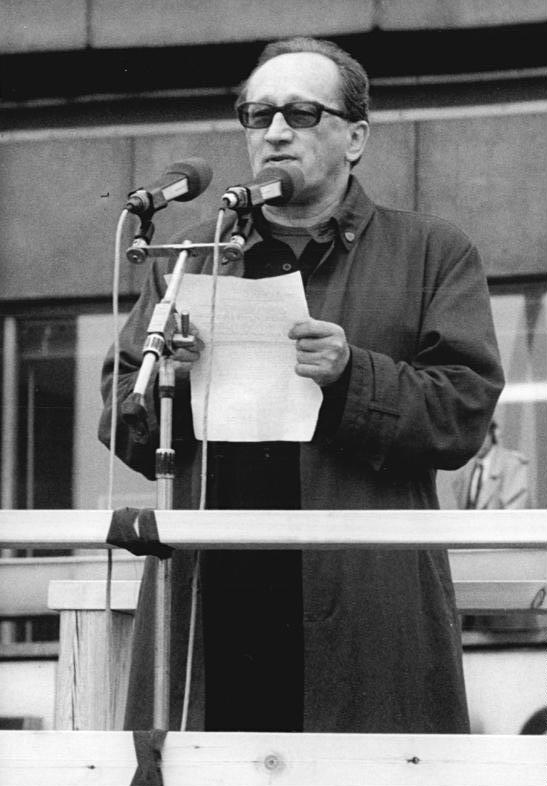 ADN-ZB Link 4.11.89 Berlin: Demonstration 500.000 Bürger beteiligten sich an einer Demonstration für den Inhalt der Artikel 27 und 28 der Verfassung der DDR. Auf dem anschließenden Meeting auf dem Alexanderplatz ergriff auch der Dramatiker Heiner Müller das Wort.